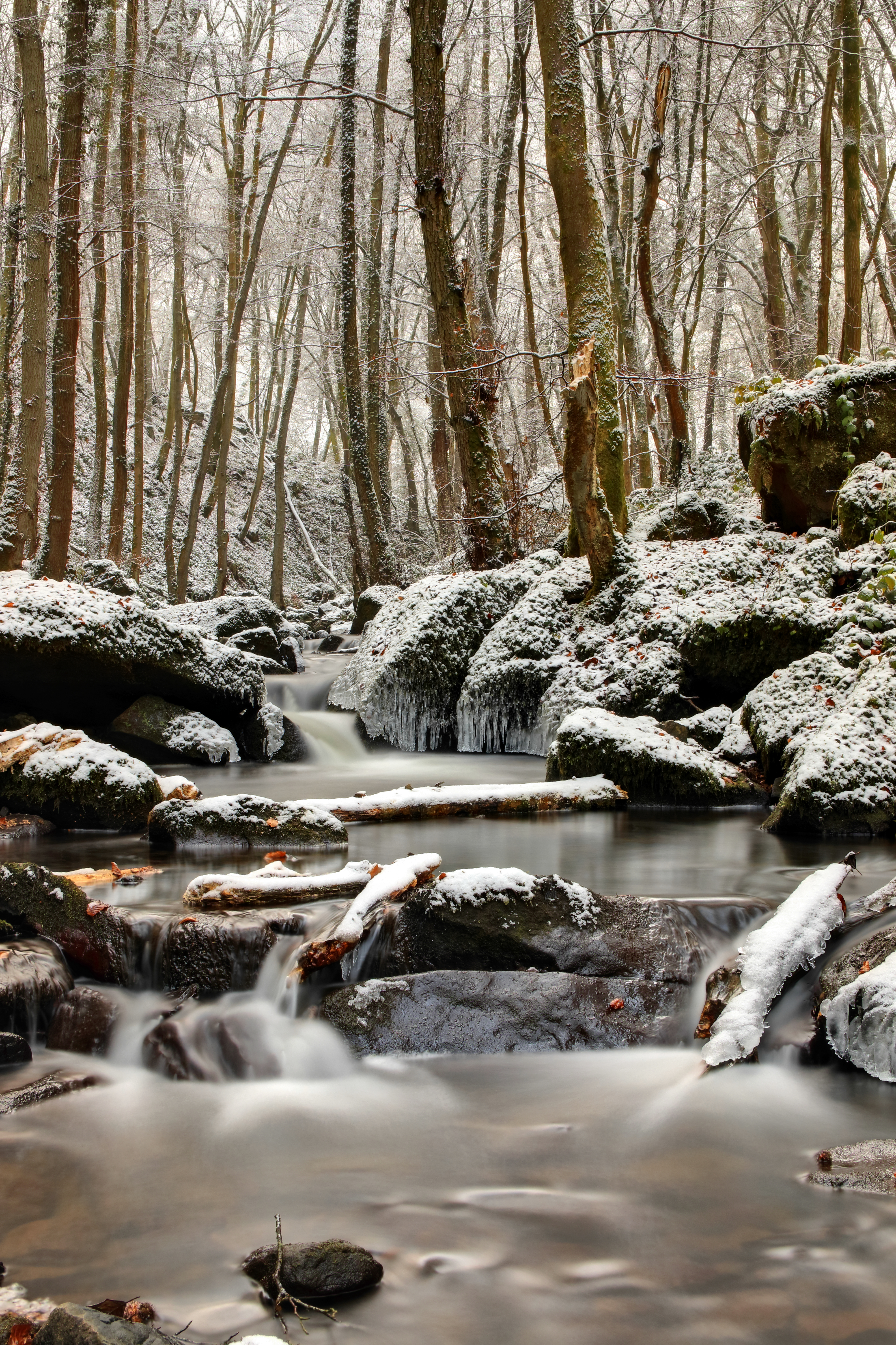 Die Leuk in der Kollesleuker Schweiz im FFH Gebiet Serriger Bachtal und Leuk und Saar (6405-303)